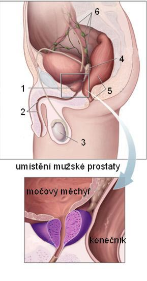 Mnou pro českou wikipedii upravený obrázek z anglické wiki, kde je v public domain